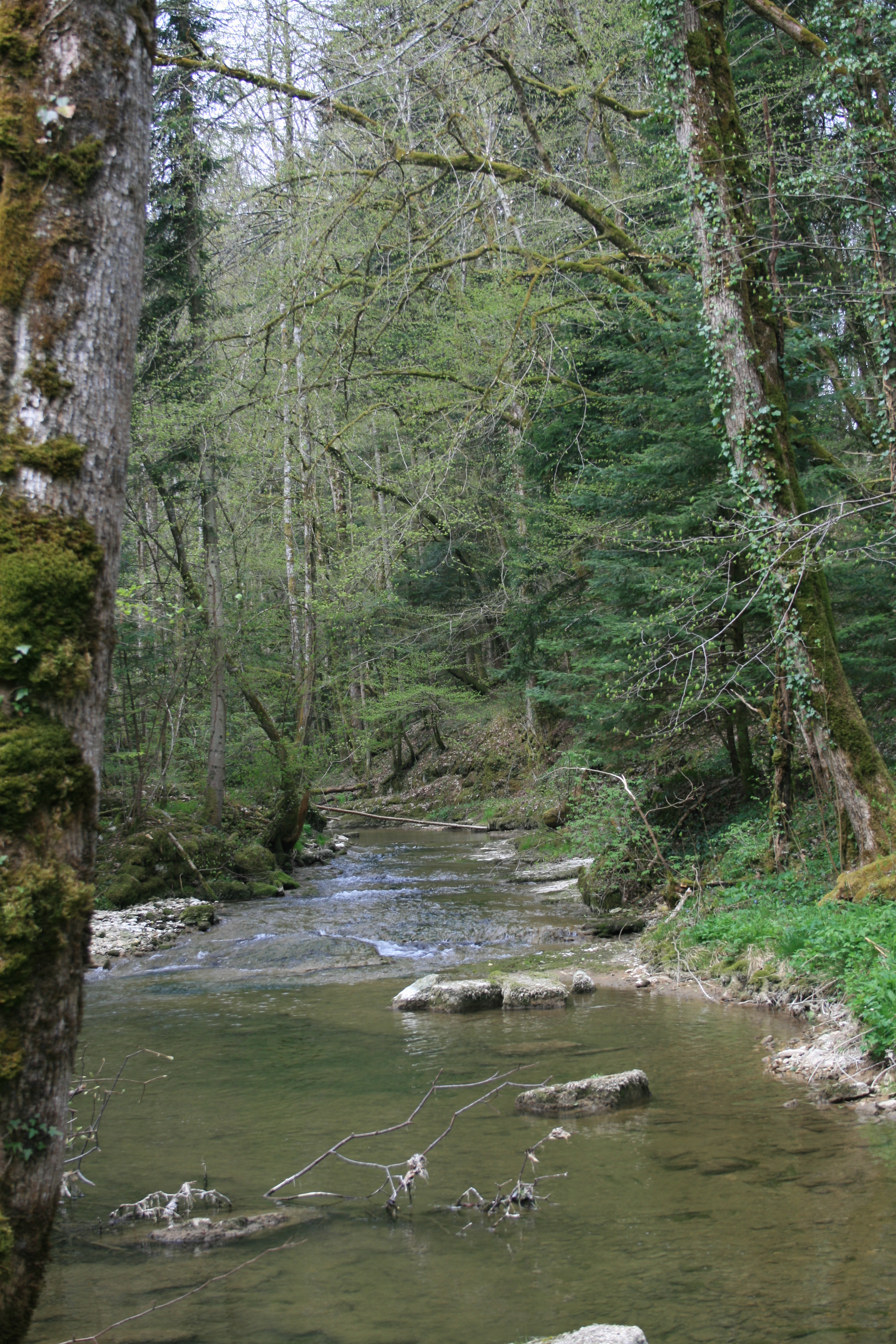 La Lucelle, France - Suisse